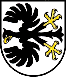 Wappen der politischen Gemeinde de:, Schweiz